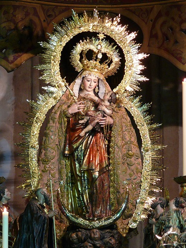 Nuestra Señora Reina de Todos los Santos. Solemne Novena 2008